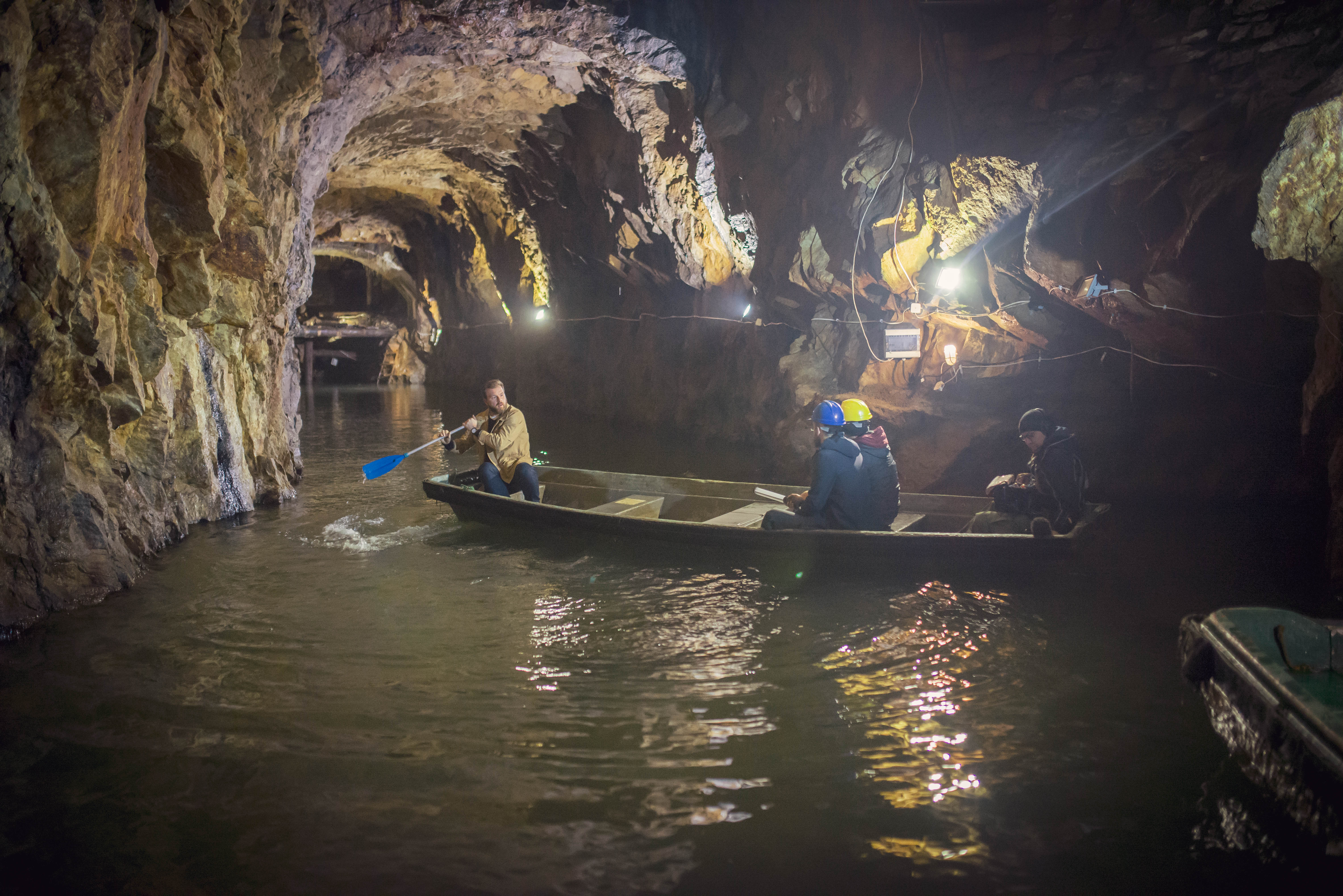 Ekipa zdjęciowa Tvworking przeprawiająca się przez Kompleks Włodarz, stanowiącego część Projektu Riese.